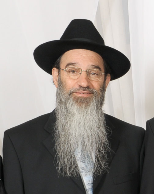 תמונת פנים של צבי ענבל